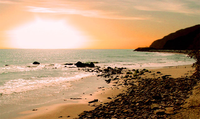 Malibu sahili ... Resim gene bana ait :)